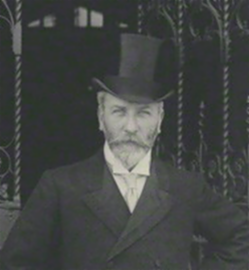 Detalhe da foto de E. T. Reed de foto de Sir John Benjamin Stone.